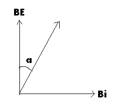 סטיית מחוג המצפן בהשפעת זרם חשמלי